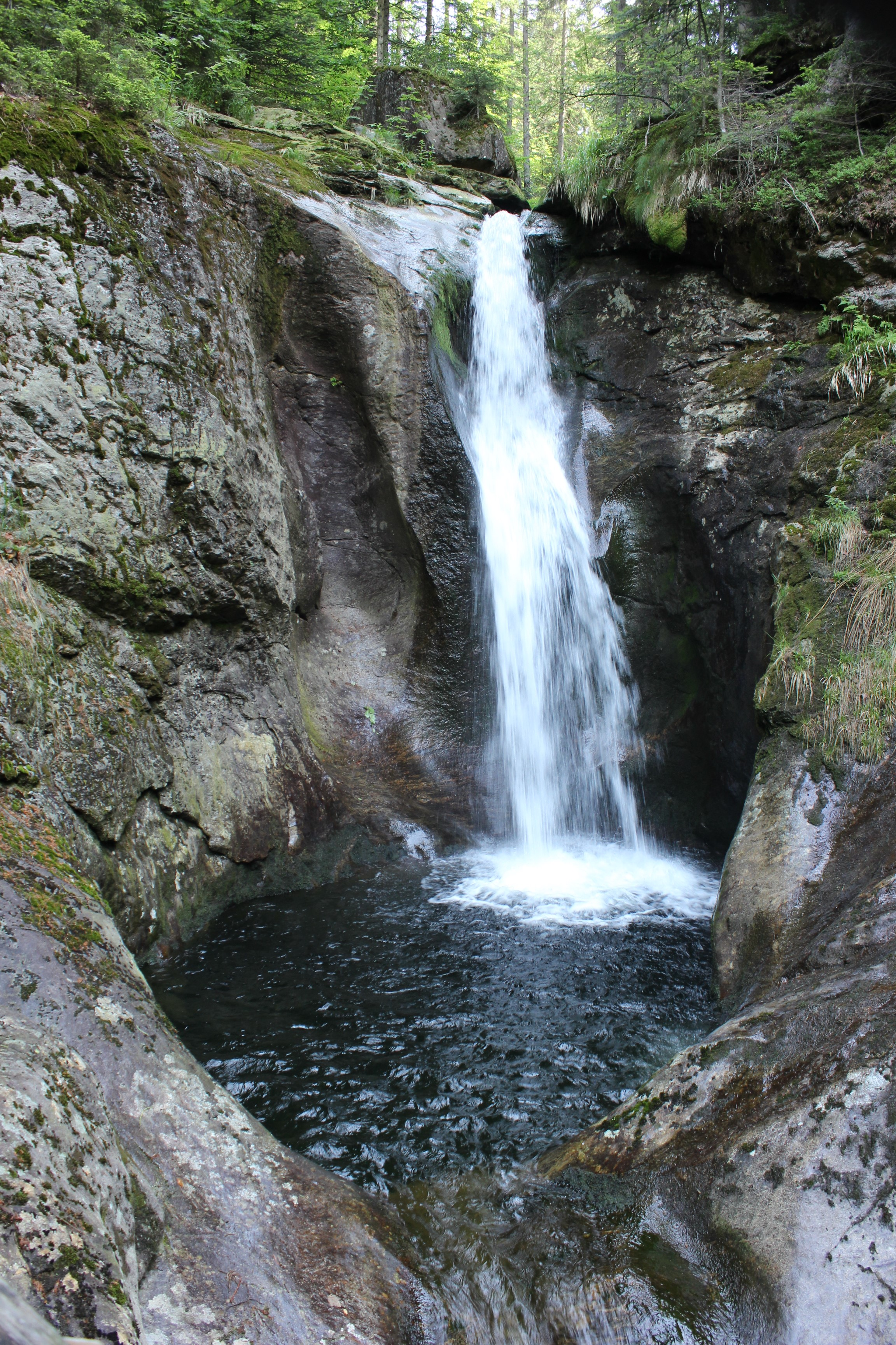 Der Hochfall bei Bodenmais im Bayerischen Wald ist ein Naturdenkmal. Das Wasser stürzt in mehreren Kaskaden zu Tal. Der Hochfall ist zugleich auch Geotop im Landkreis Regen. Hochfall im Moosbachtal mit der NR. 276R016.